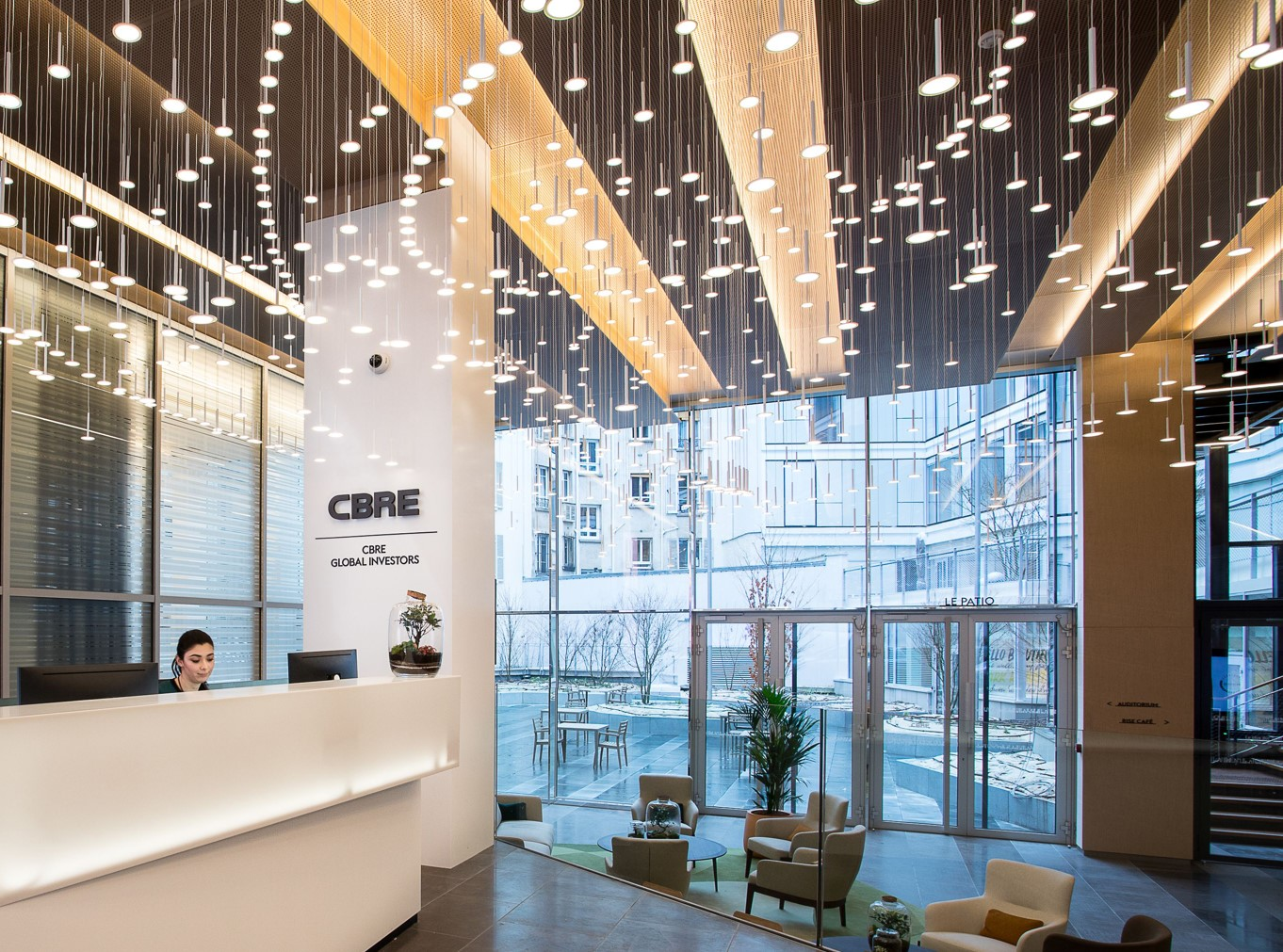 Flex office, espaces collaboratifs, digital... Un showroom et laboratoire de 8 000 m² au cœur du 17ème arrondissement.